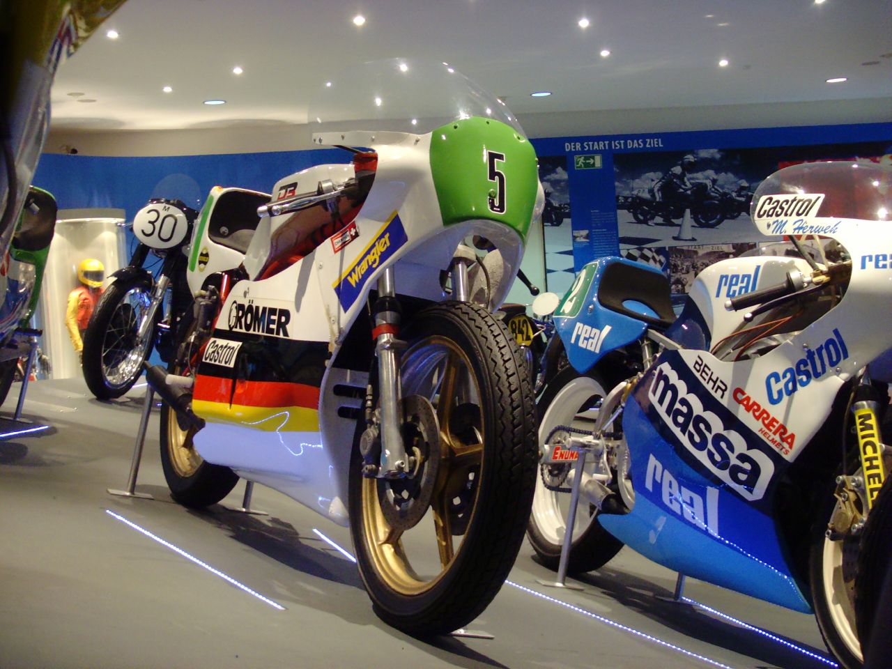 249 ccm, Zweizylinder-Zweitakt, 60 PS bei 11.800 U/min. 108 kg, 240 km/h. Deutsches Zweirad- und NSU-Museum Neckarsulm.